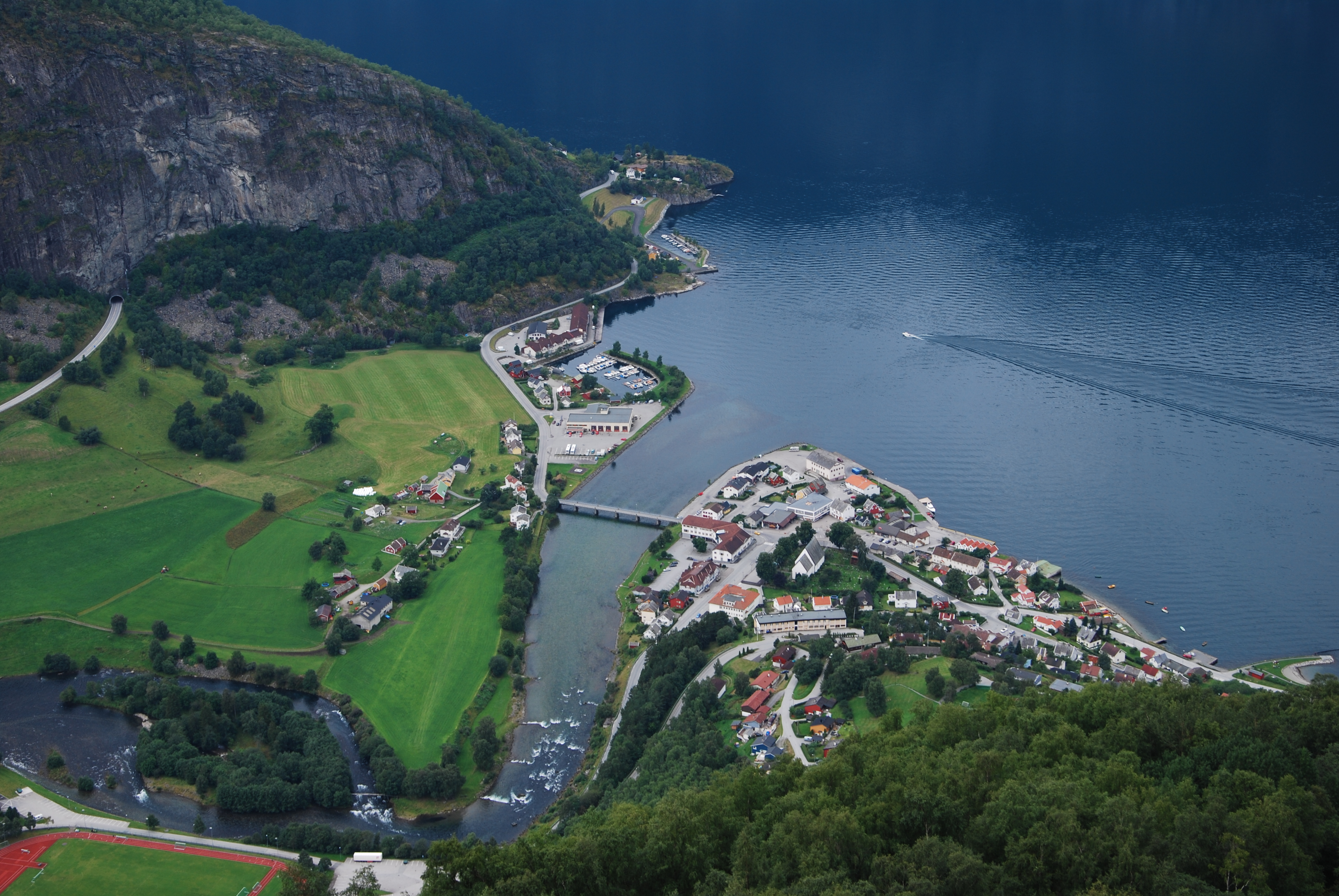 Aurland